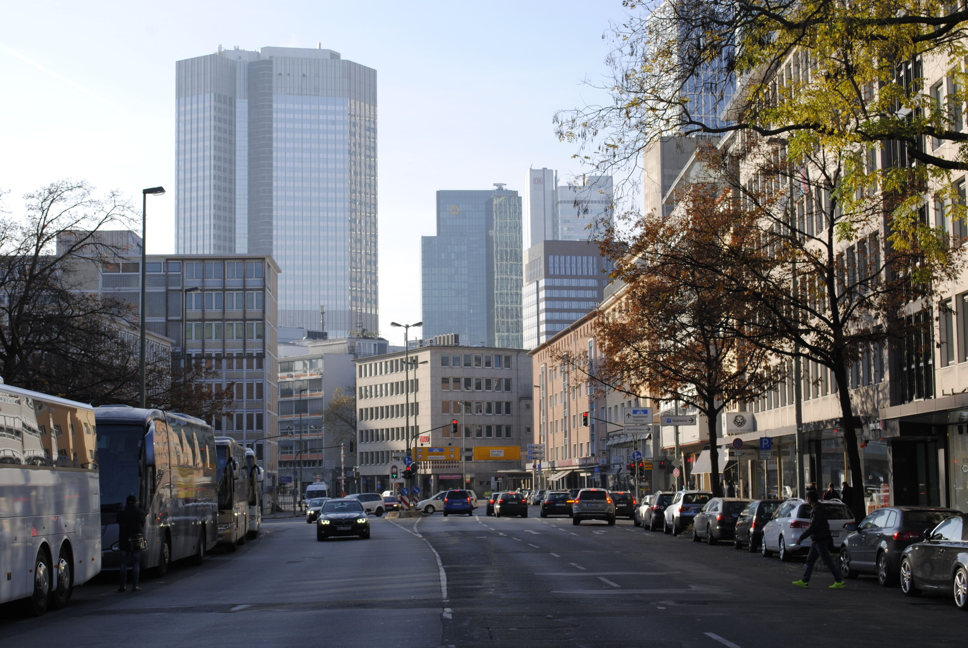 Berliner Straße in Richtung Westen